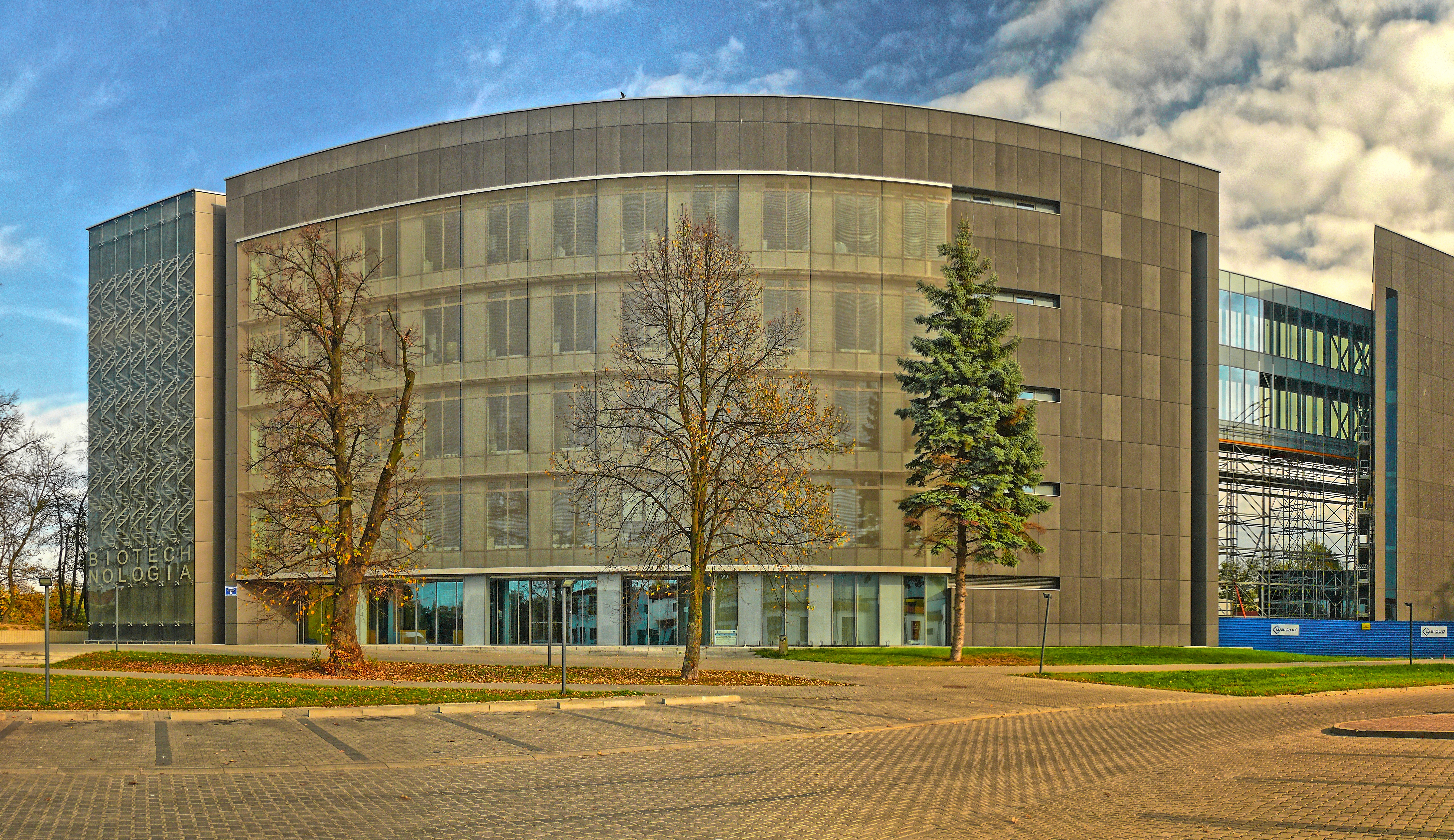 budynek Katedry Biotechnologii Katolickiego Uniwersytetu Lubelskiego w Lublinie